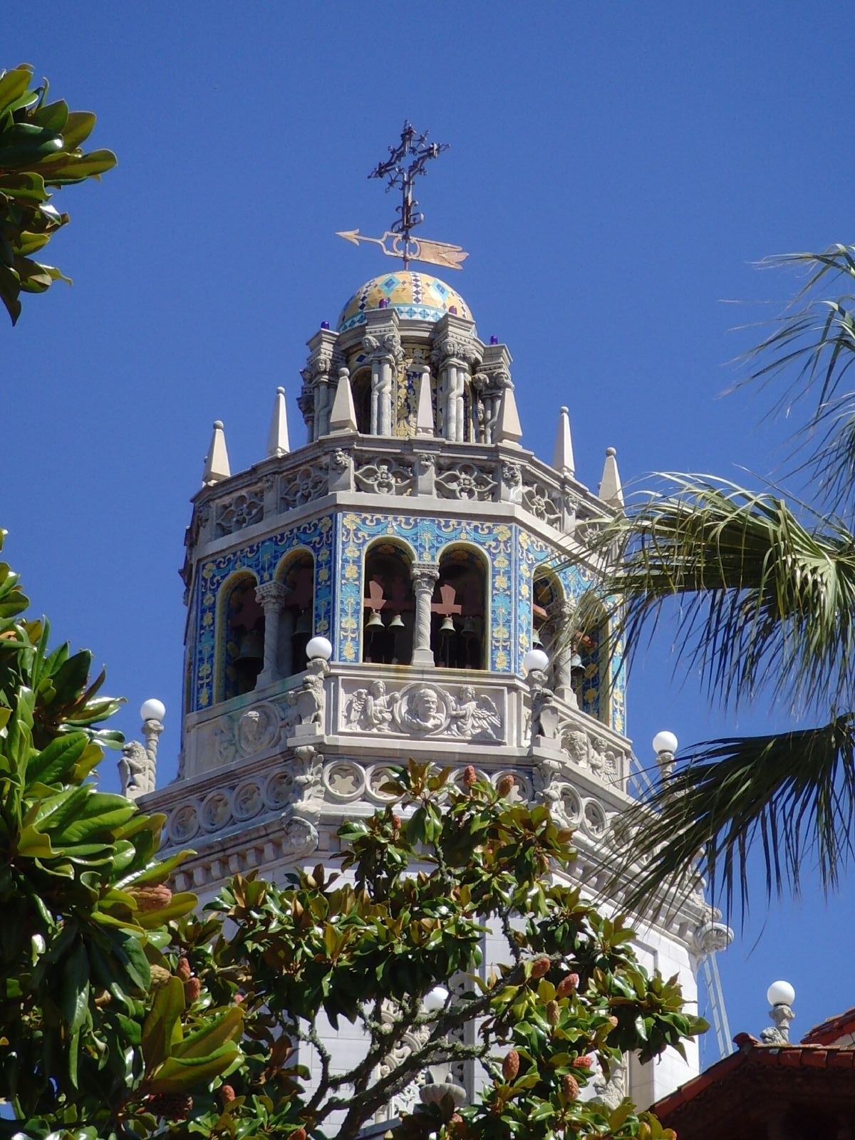 Casa Grande